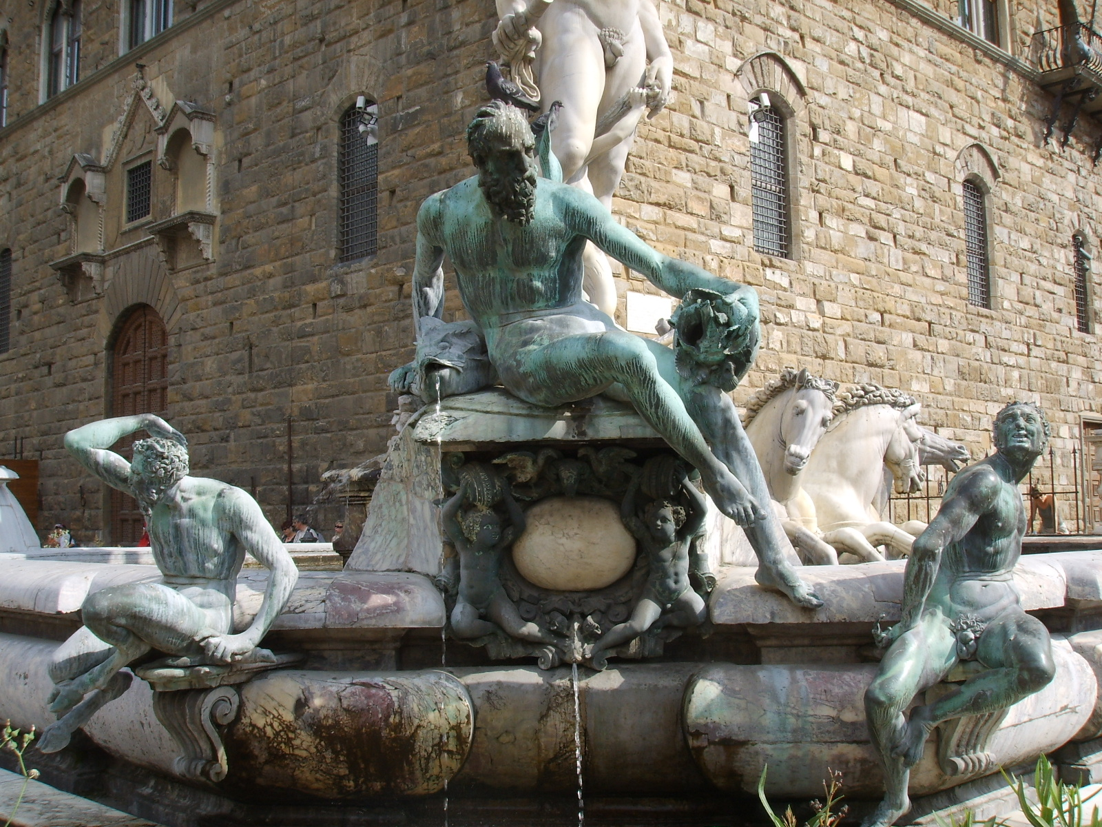 Giambologna_e_ammannati,_fontana_del_nettuno,_dettaglio